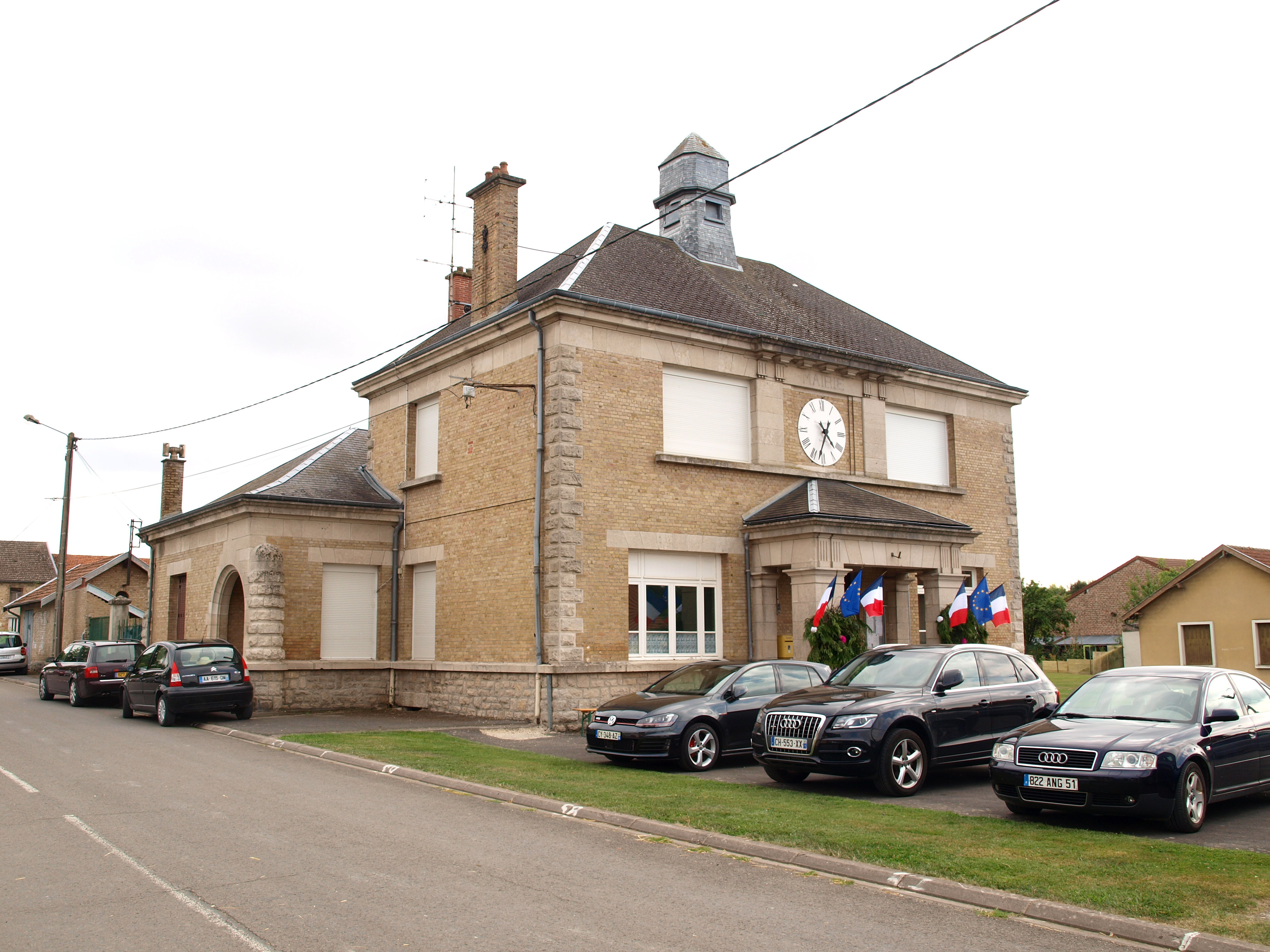 Saint-Étienne-à-Arnes (Ardennes, France) ; mairie